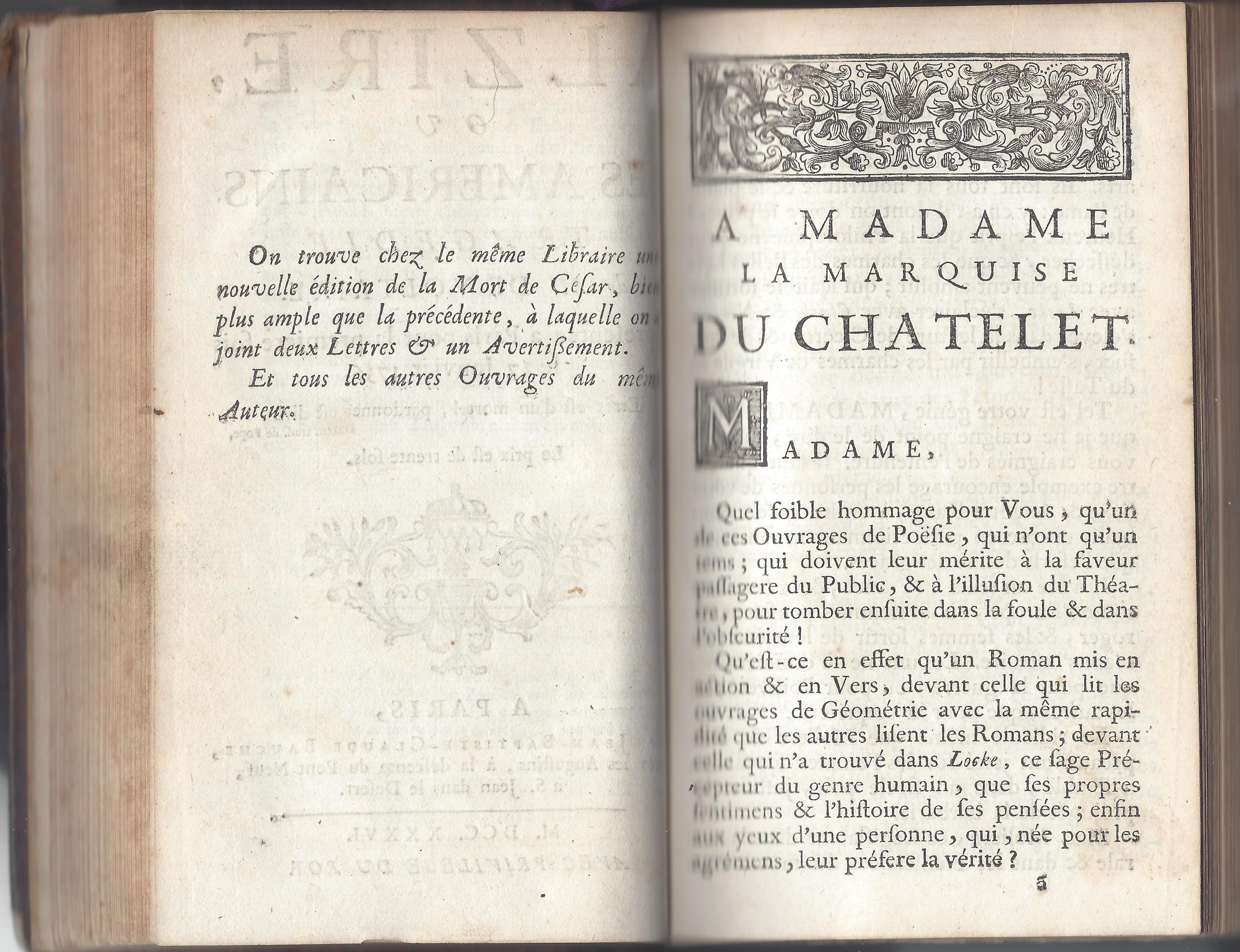 Titelblatt der Erstausgabe Typ A von Voltaires Epitre an Émilie du Châtelet Alzire bei Bauche, 1736